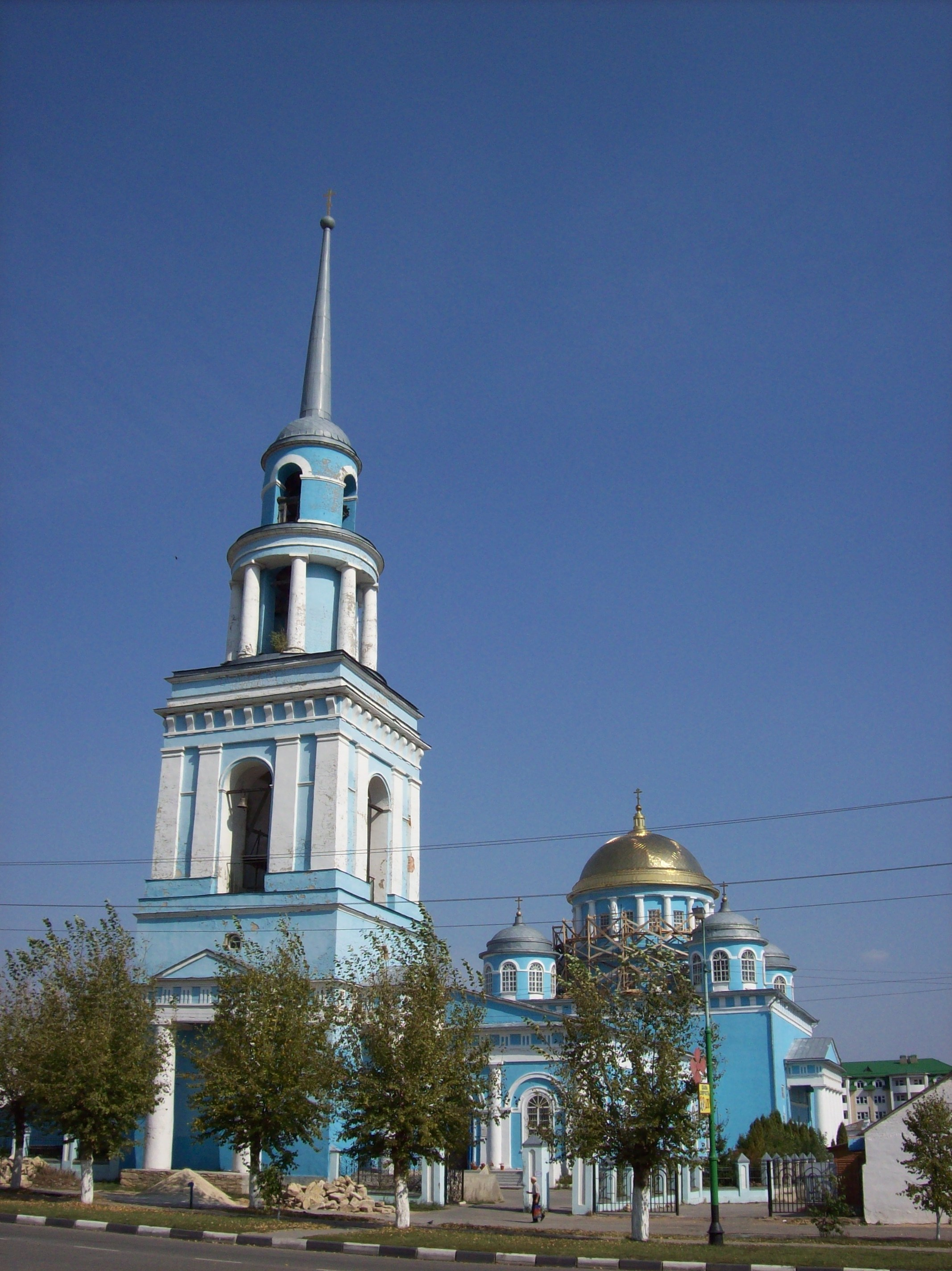 Лебедянь. Ново-Казанский собор